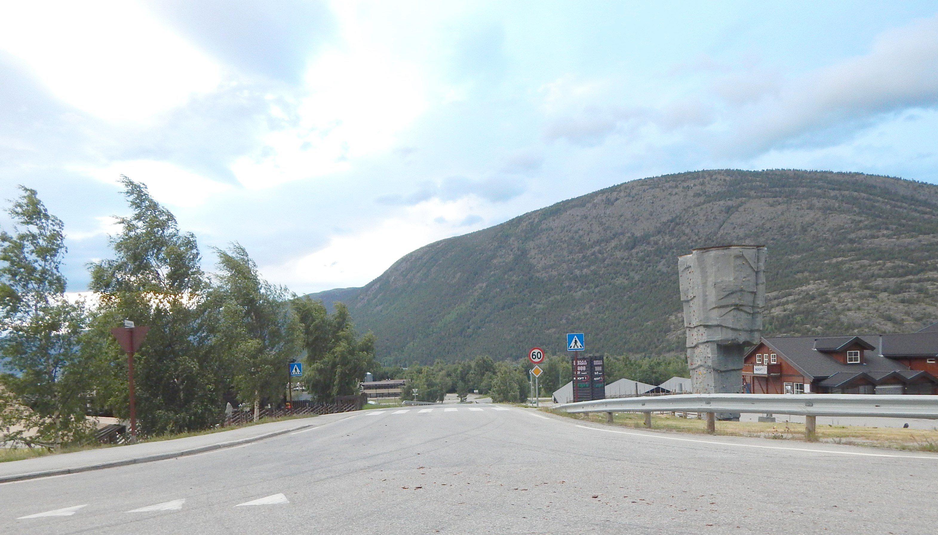 Liavegen (fylkesvei 468) på Lom (Fossbergom), ved riksvei 15